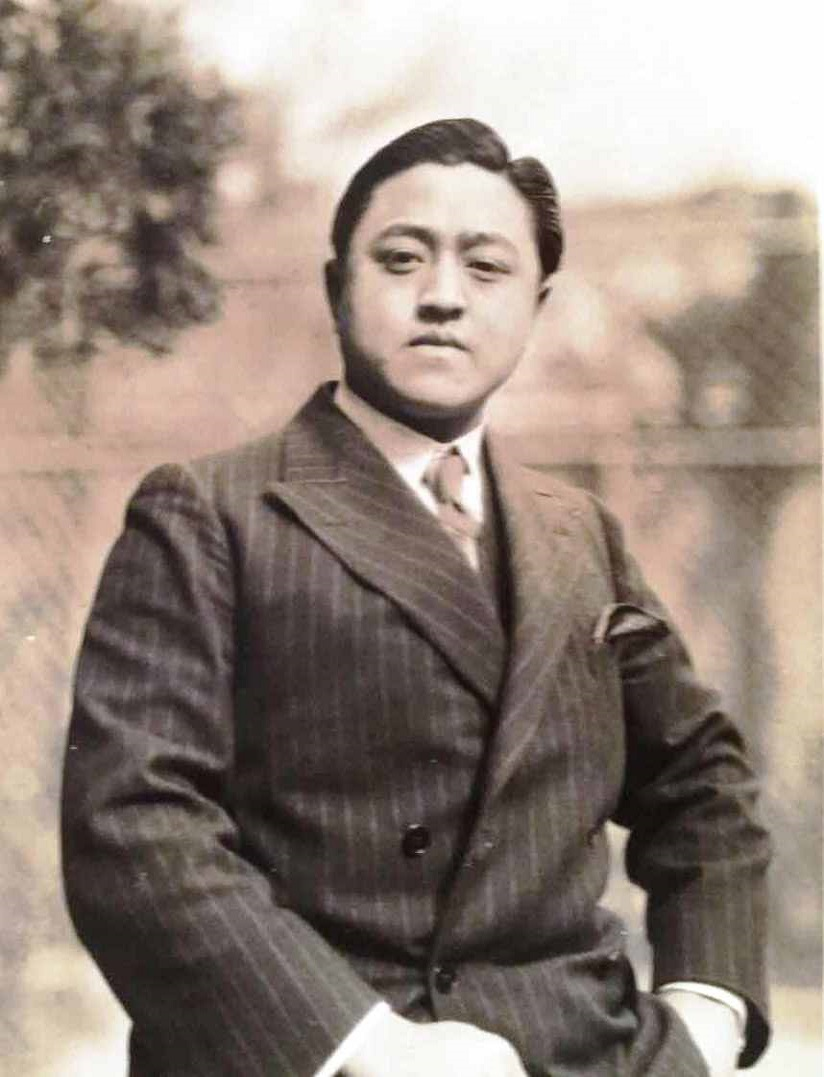 中文（中国大陆）: 具有120年历史的安康钱庄（桕墅方第五代）董事长方哲民